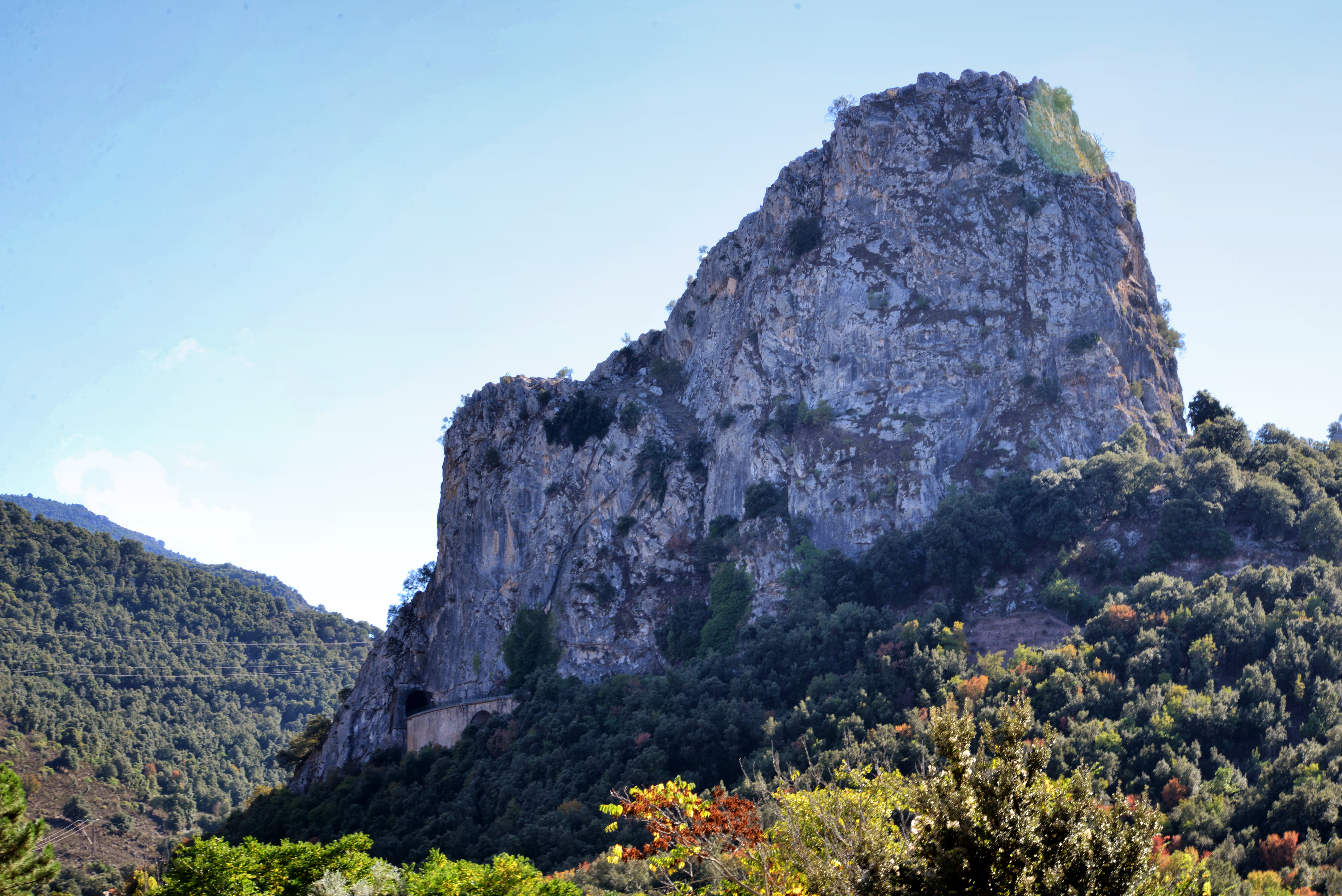 Omessa, Centre Corse - Le Monte Pollino (456 m.) à Caporalino, au nord de la Serra a Supietra, traversé par le tunnel de la Serra a la Figa, et sur lequel subsistent les vestiges du Castello di Supietra.